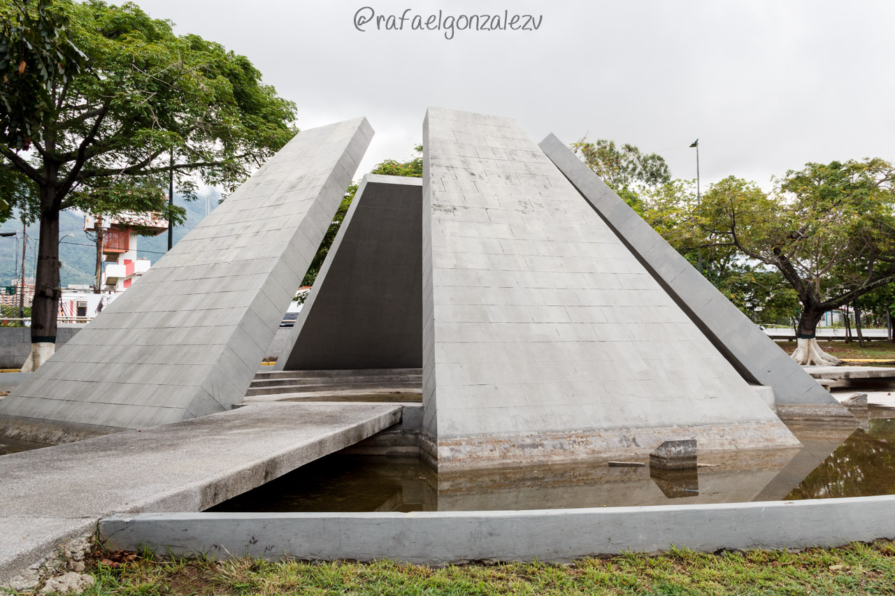 También llamada alternativamente Plaza Monumento a Armenia es el nombre que recibe un espacio público localizado en La Estancia de Chuao, un sector del Municipio Chacao en Caracas, Venezuela. Homenaje de la comunidad de Armenia a los caídos en 1915. "Erigimos este monumento en este bello país Venezuela que es hoy nuestra patria, a ella le debemos honor porque nos recibió dándonos un pedazo de lo que antes fuimos"